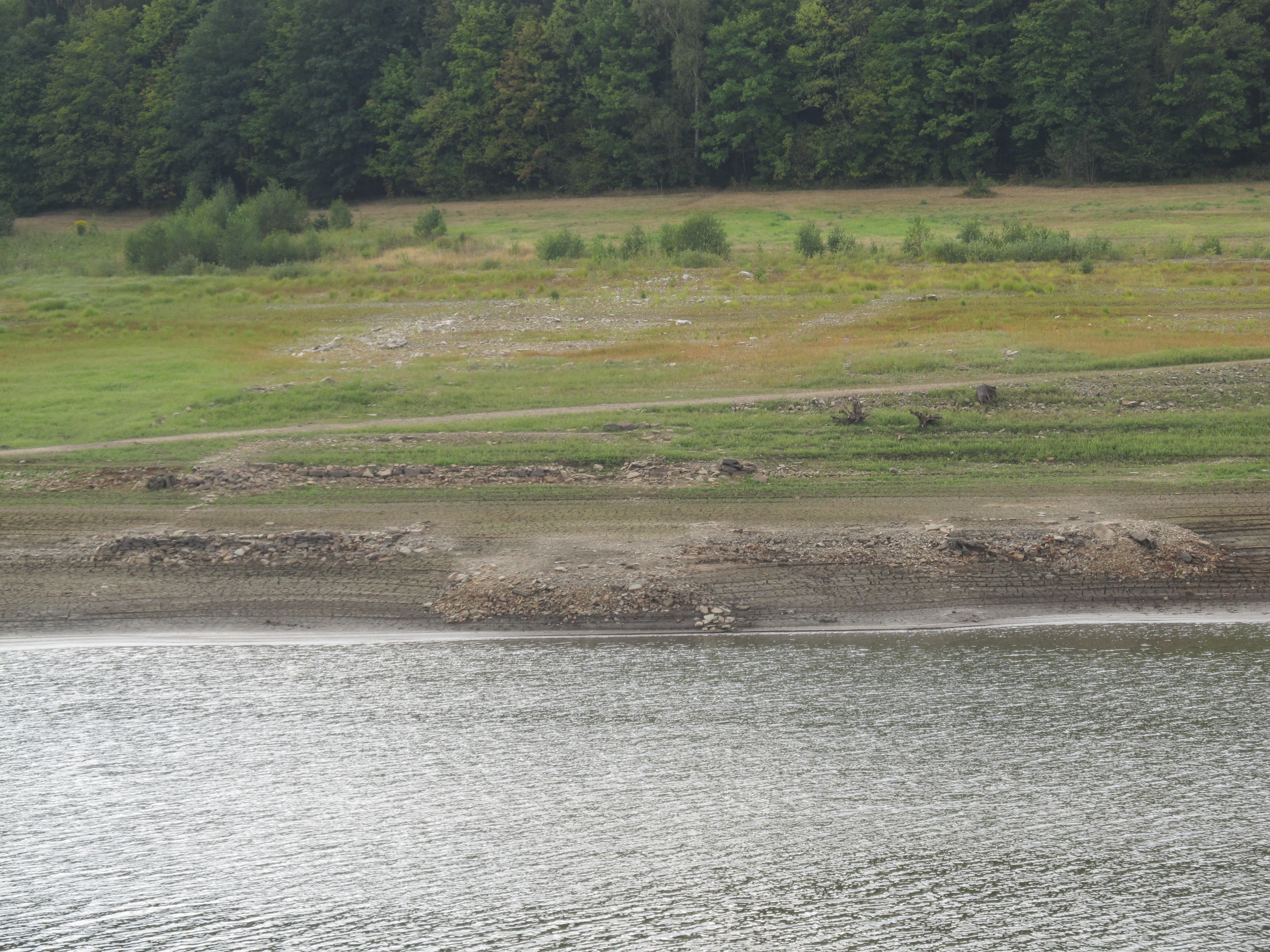 Grundmauern abgebrochener Gebäude in Steinbrückmühle, Talsperre Lehnmühle, Gemeinde Hartmannsdorf-Reichenau, Sachsen